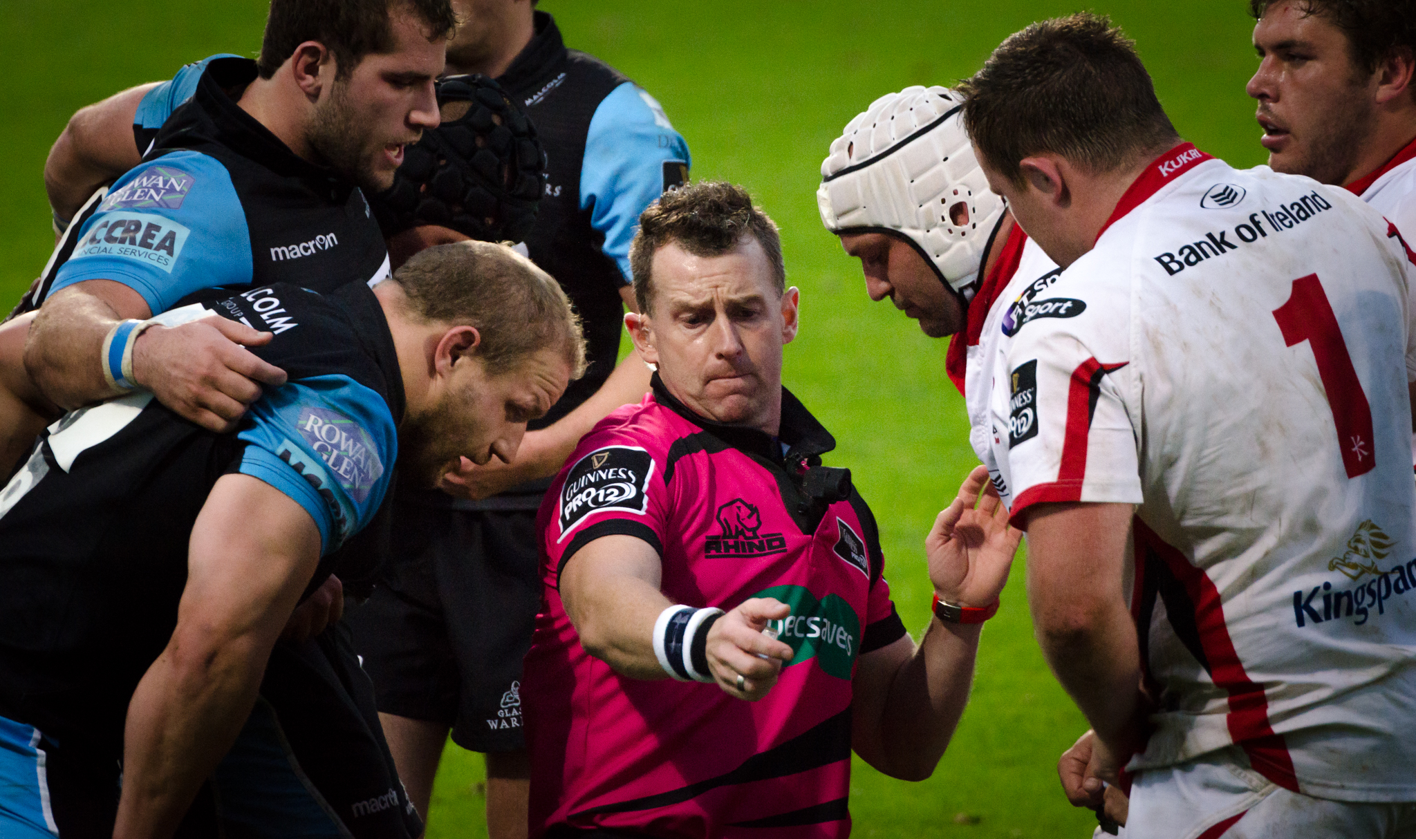 Ulster rugby v Glasgow